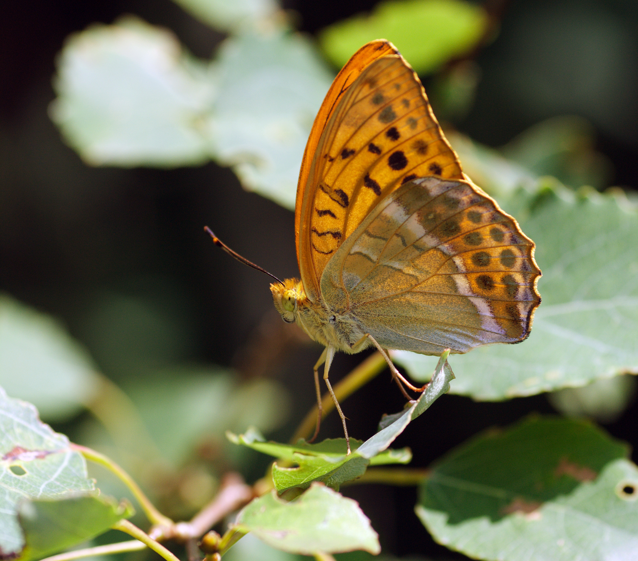 Rohetäppik profiilis, Põlvamaa